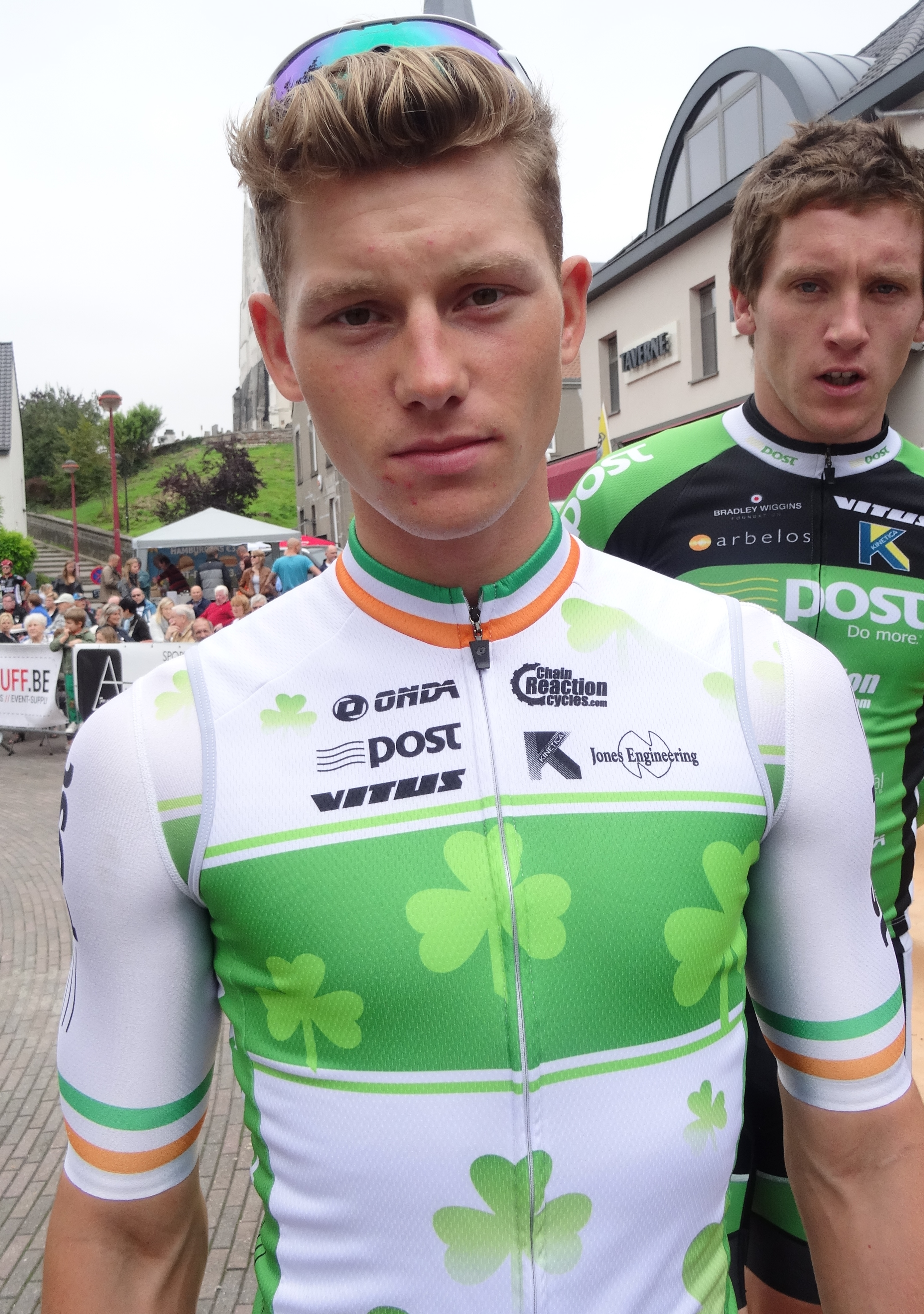 Reportage photographique réalisé le mercredi 27 août à l'occasion du départ de la Druivenkoers Overijse 2014 à Huldenberg, Belgique.